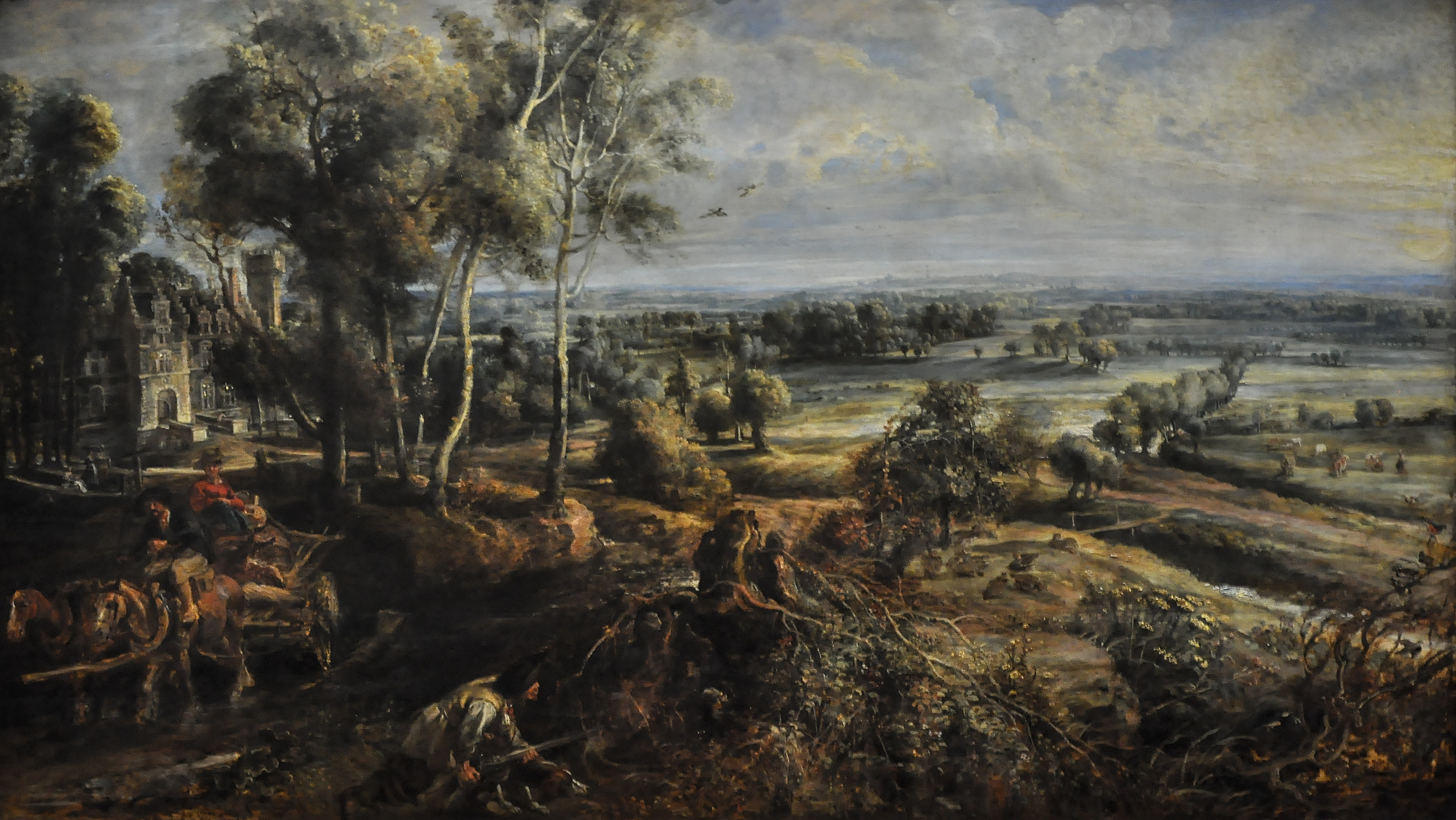 Peter Paul Rubens (1577-1640) Herfstlandschap met het Steen - National Gallery Londen 5-3-2015